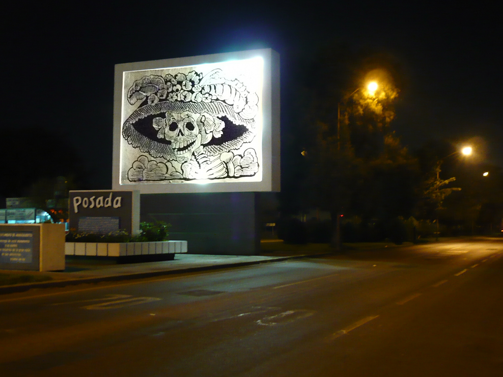 Monumento a la catrina en la entrada a la ciudad de Aguascalientes.